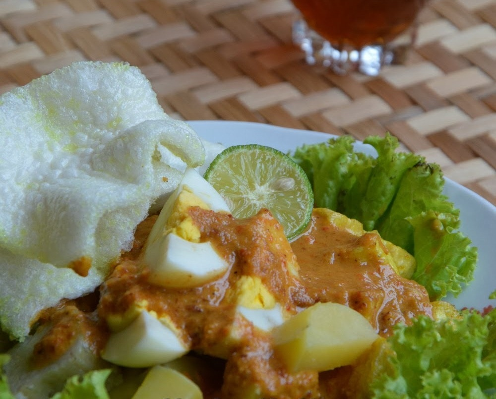 Basa Sunda: Kadaharan urang sunda ti Bogor